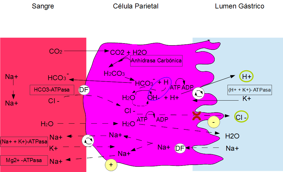 Adaptación imaginaria del mecánismo posible de formación de ácido clorhídrico dentro de una célula parental.